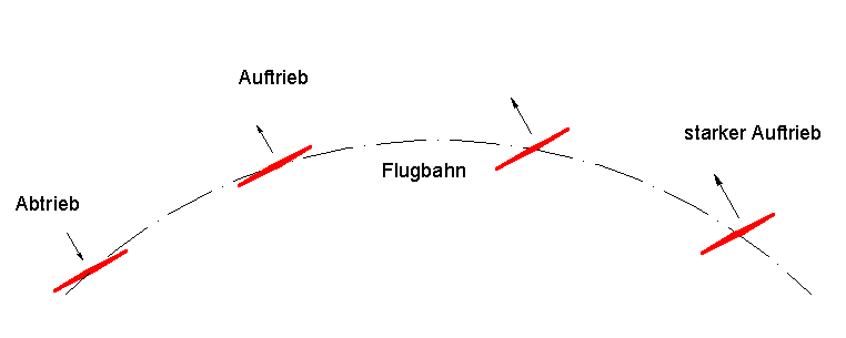 DiskusFlug - Aerodynamik